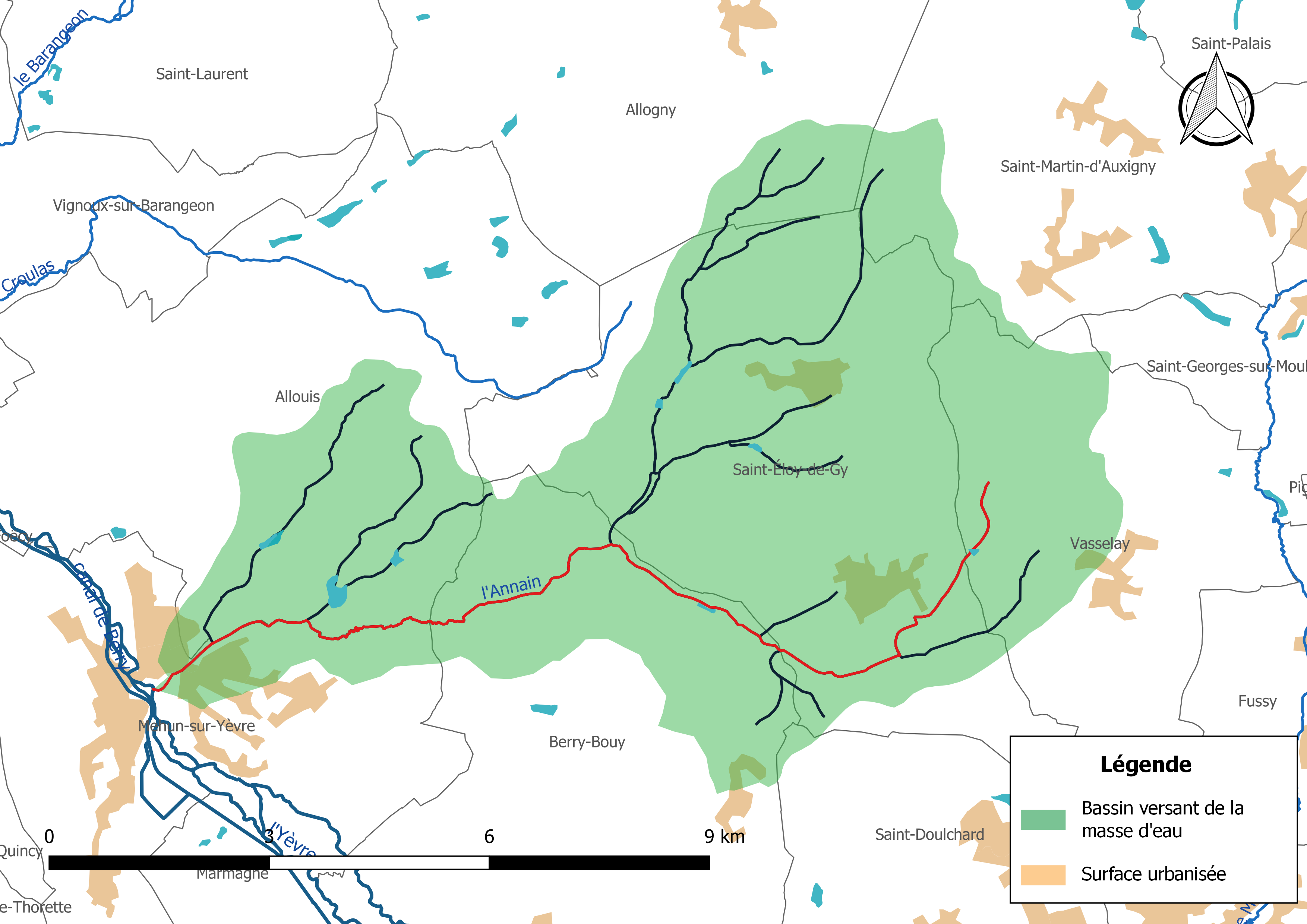 Carte de la masse d'eau « FRGR2118 » avec mise en exergue du cours d'eau « l'Annain » (en rouge).